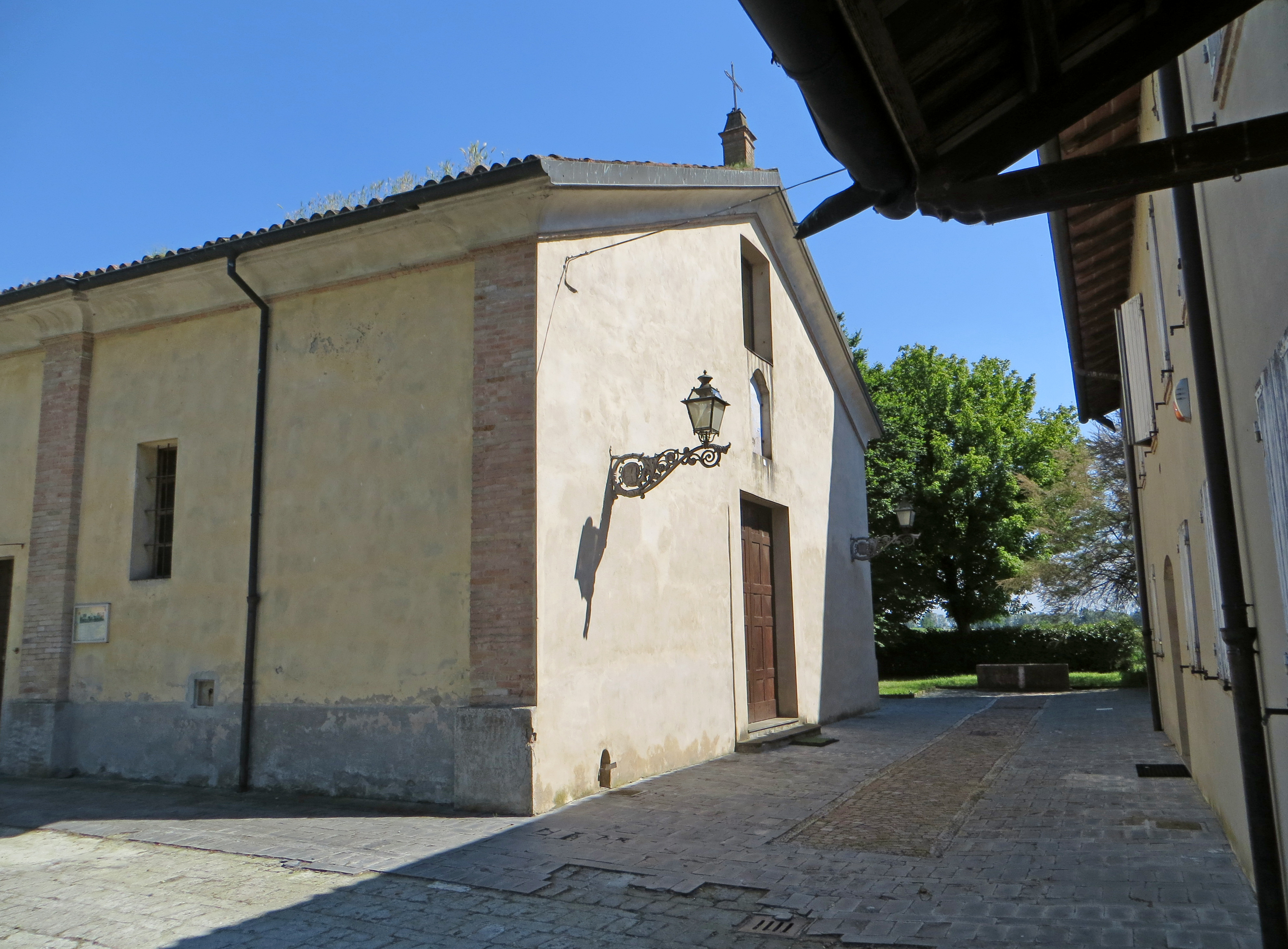 Chiesa di San Giovanni Evangelista (Castelnovo - Parma) - facciata